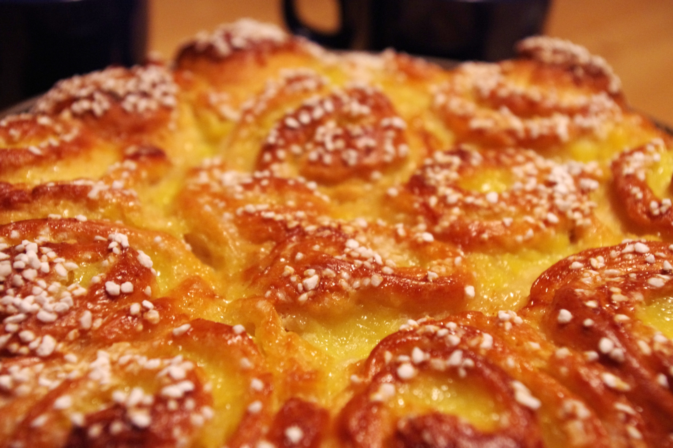 Butterkaka.